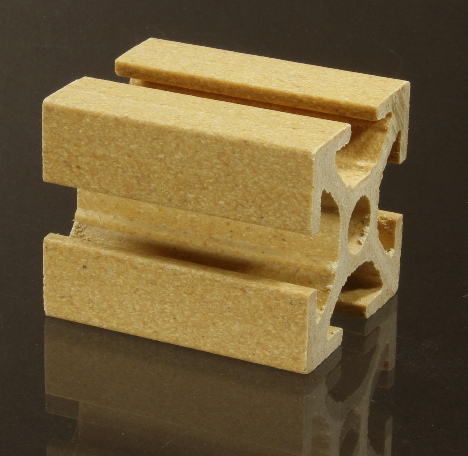 Profilblock